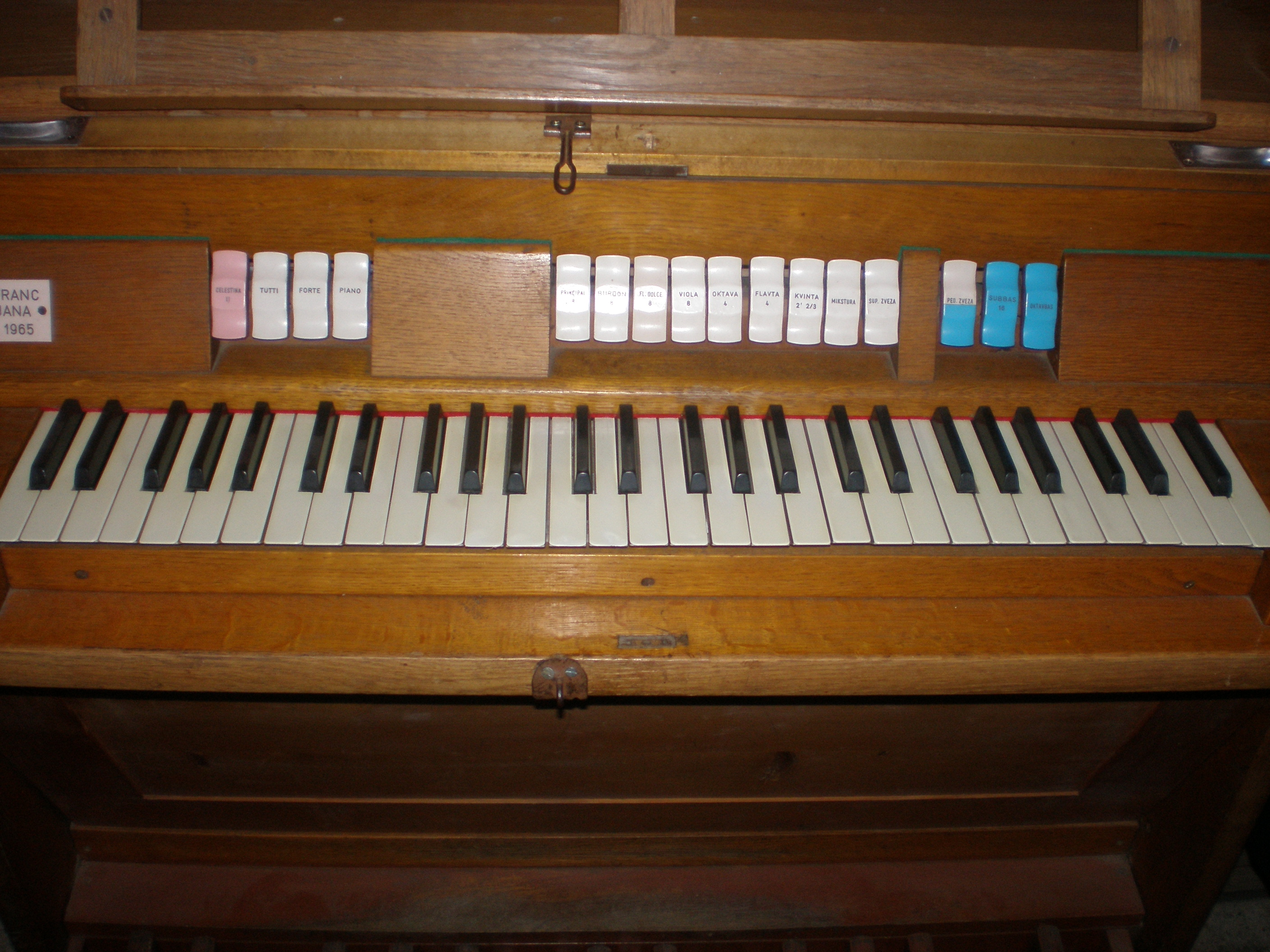 Sviraonik orgulja u crkvi sv. Elizabete Ugarske u Jalžabetu